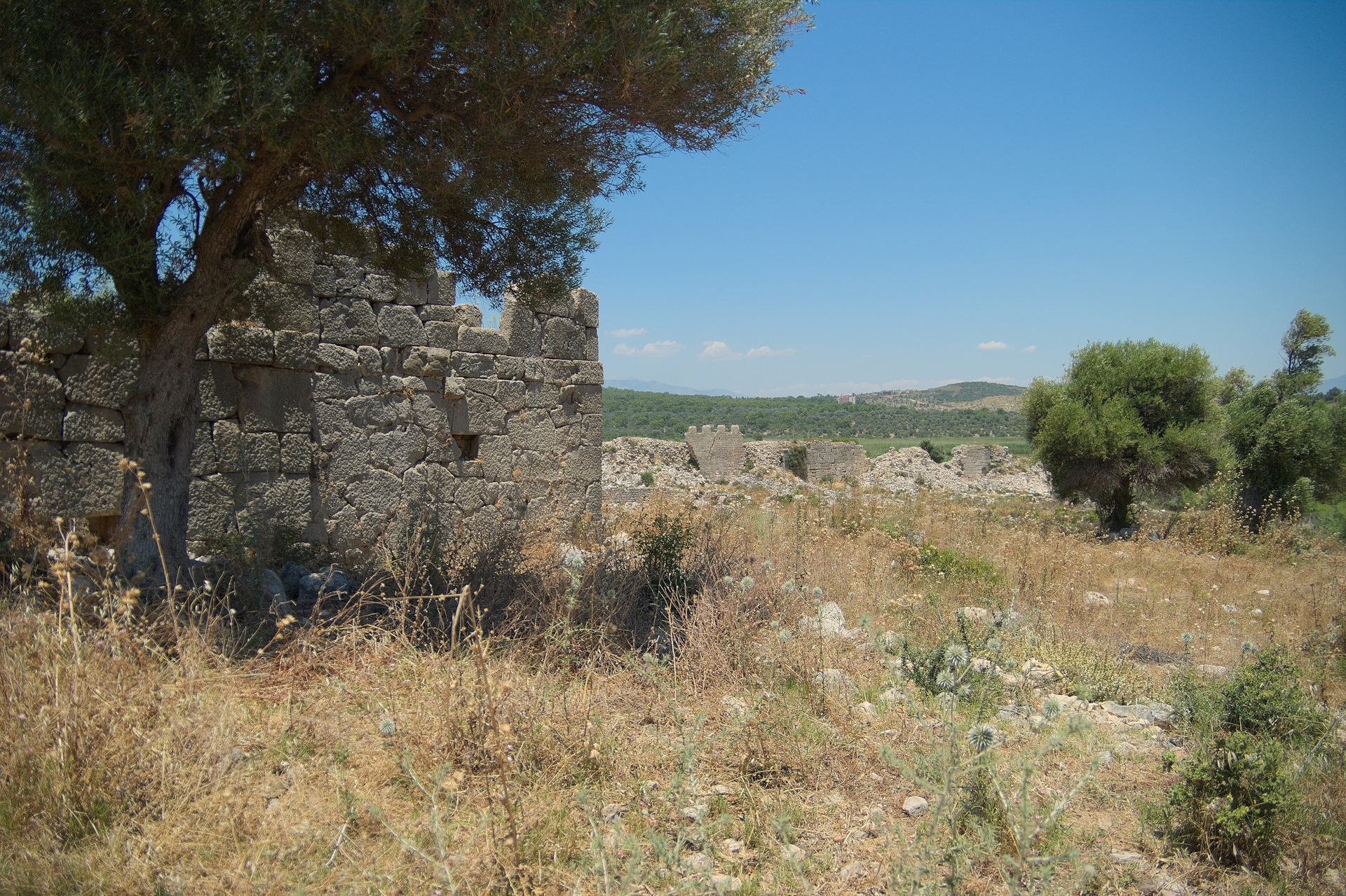 Патара. Остатки укреплений 1